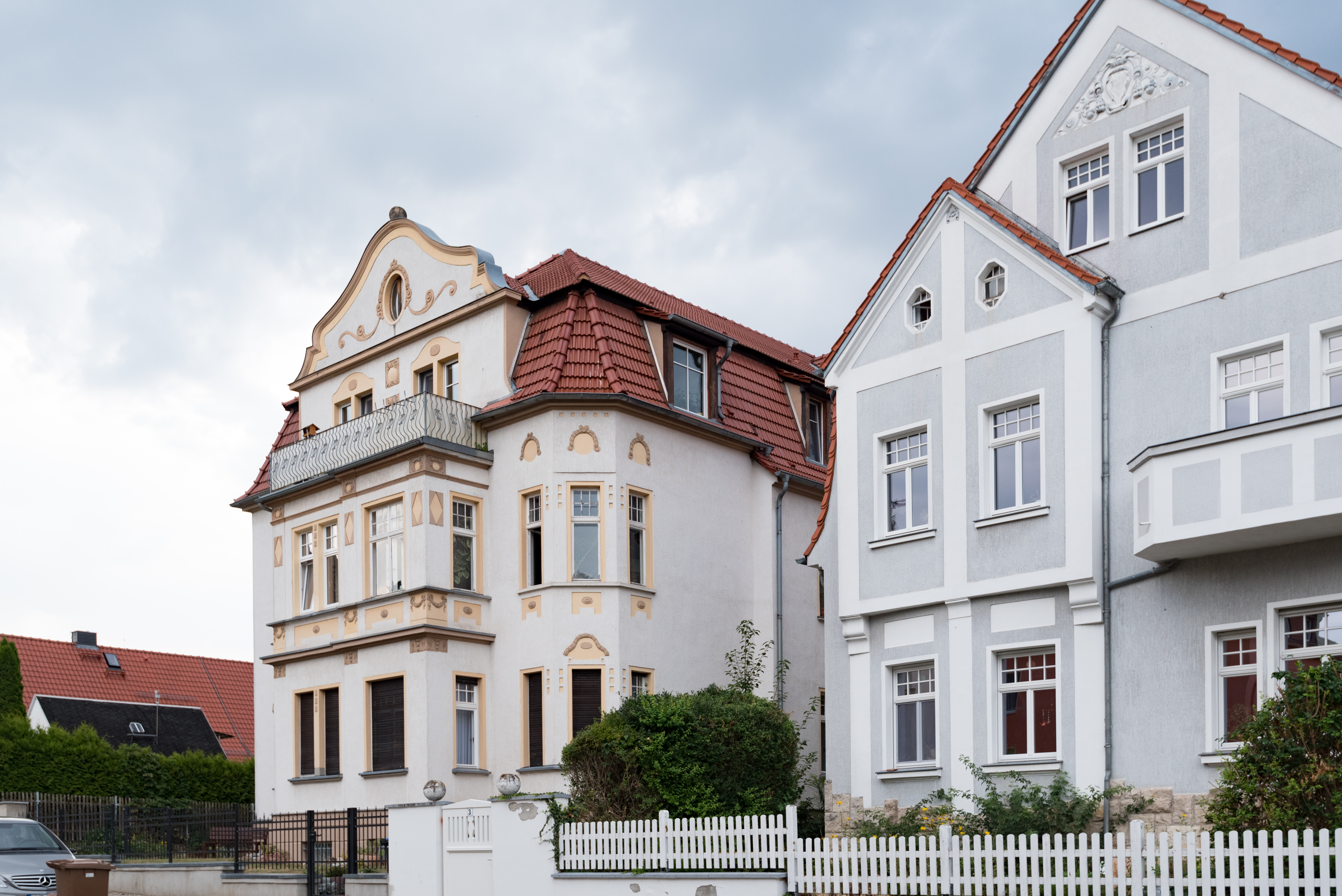 Naumburg (Saale), Oskar-Wilde-Straße 5, 3